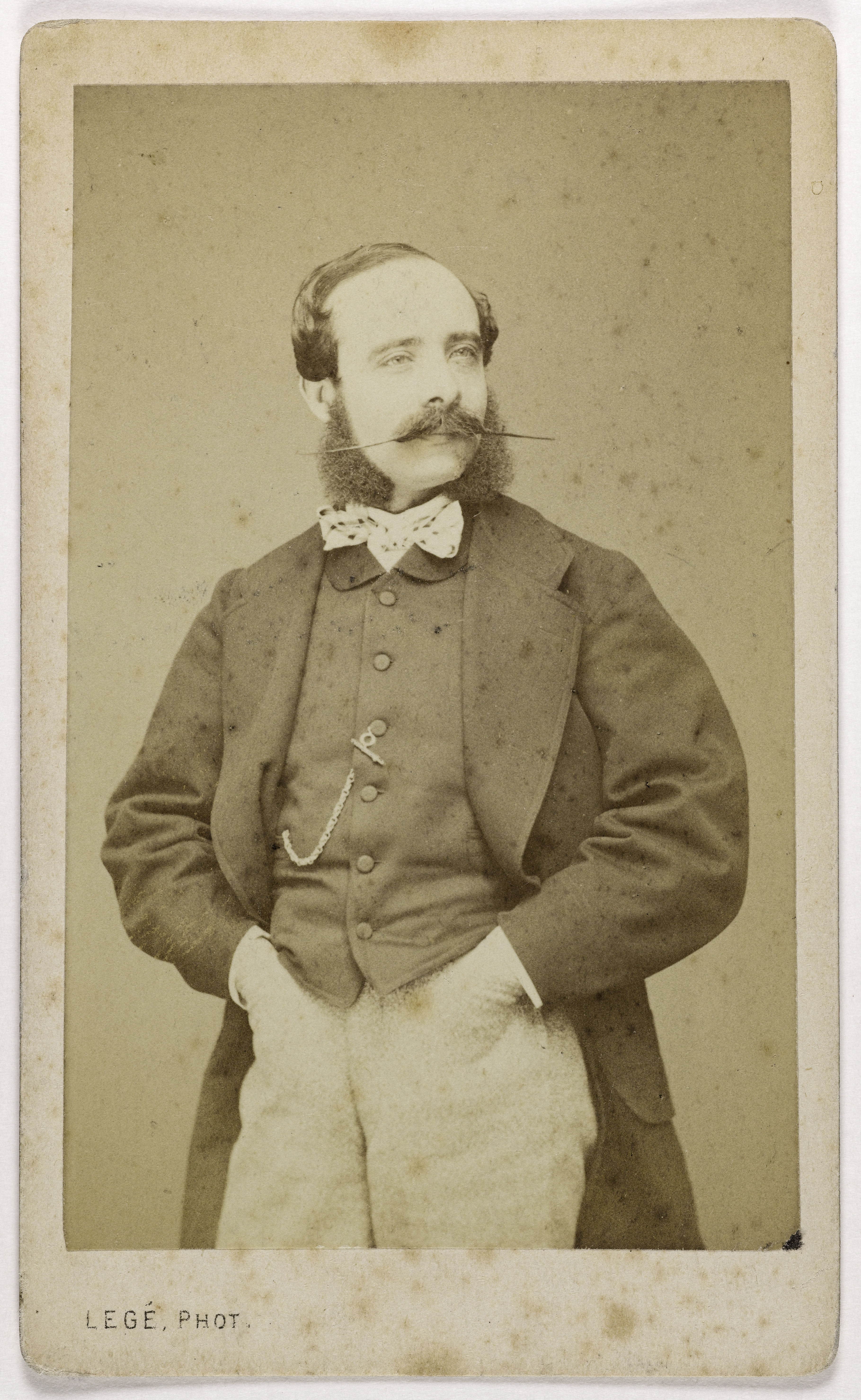 CdV - Portrait des französischen Komponisten und Violinisten Adolphe Blanc